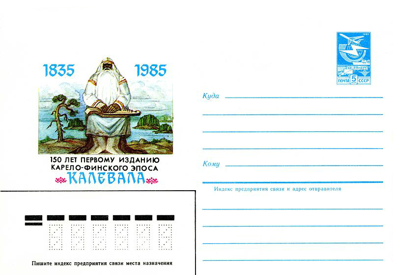 Entier postal décoré soviétique (URSS) sous forme d' une enveloppe et investi d' une valeur fiduciaire de 5 kopecks, imprimé en 1984. A titre indicatif le prix de l' entier postal est de 6 kopecks.